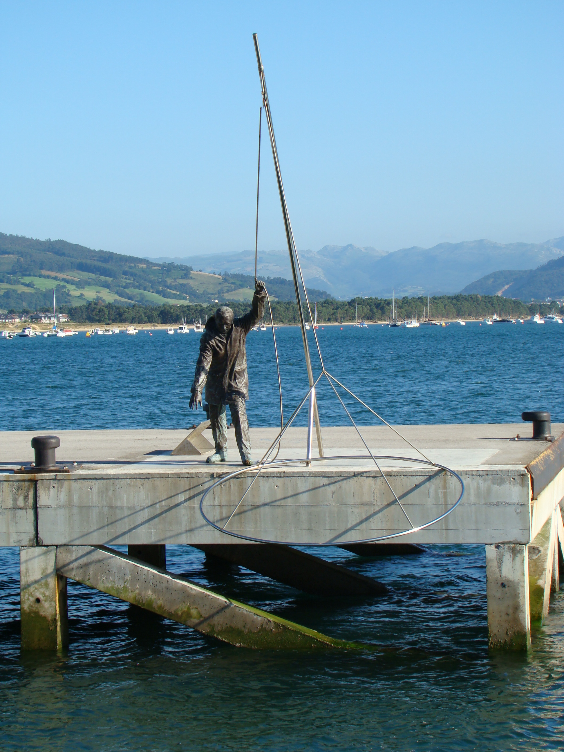 Monumento al pescador de sulas, en la machina sur. Santoña (Cantabria, España).